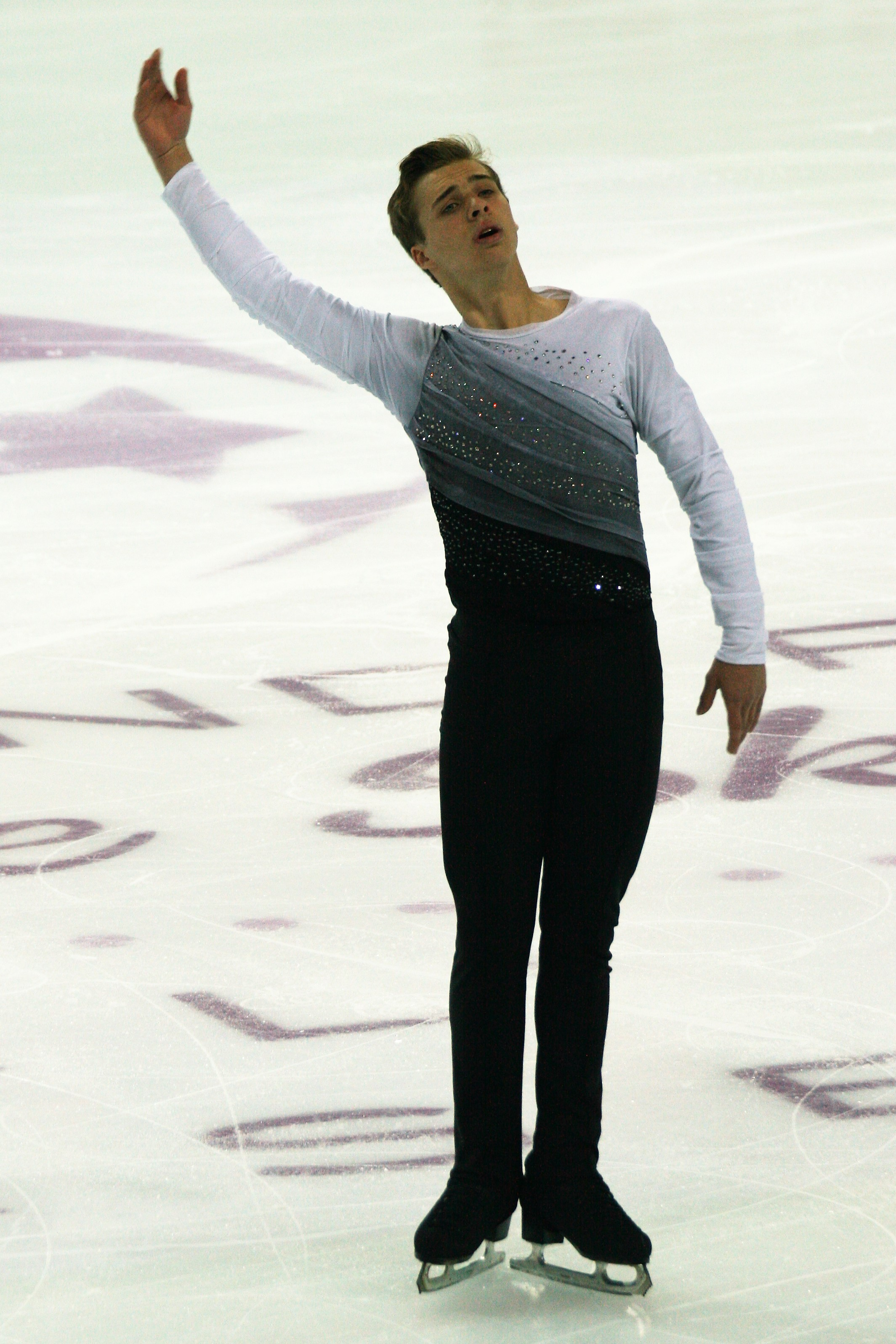 Алексей Красножон (США) на финале Гран-при по фигурному катанию среди юниоров 2016-2017